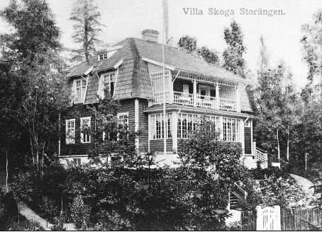 Villa Skoga på f.d. Skogsvägen - idag Krokvägen 1 A. Byggnaden ritades av arkitekt Elis Bergh på uppdrag av bokförläggare Wilhelm Widstrand, som åren 1906 - 1922 var bosatt i villan.